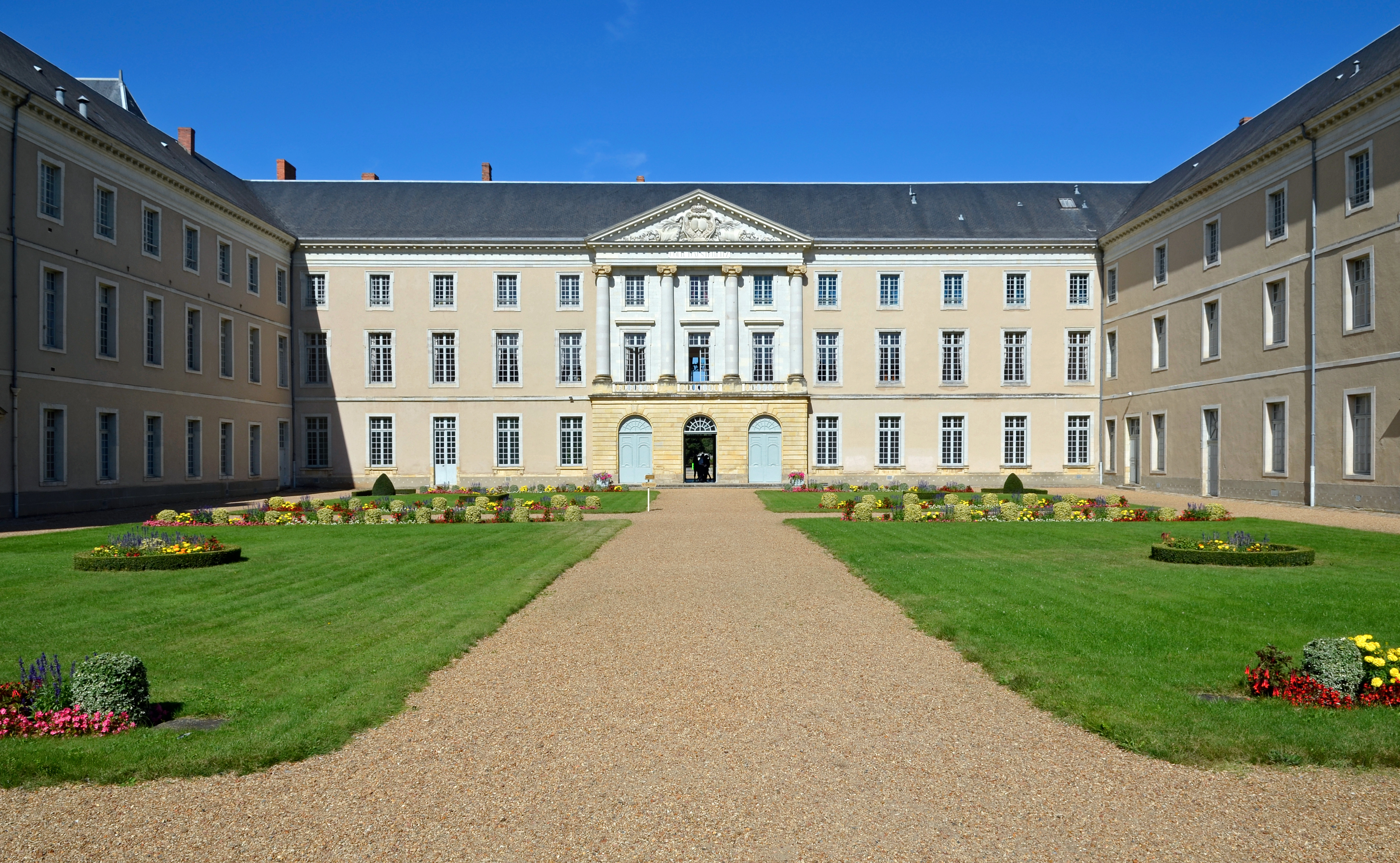 Ancien collège des Jésuites, actuellement Prytanée national militaire - La Flèche (Sarthe) .